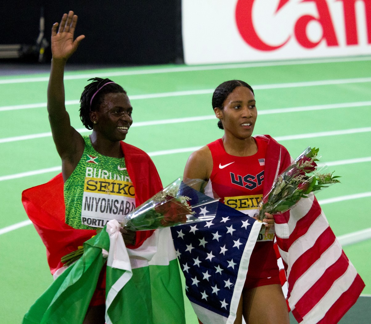 5080 800m dames